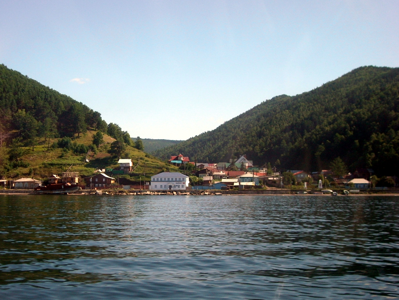 Listvyanka, poble de pesadors del llac baikal